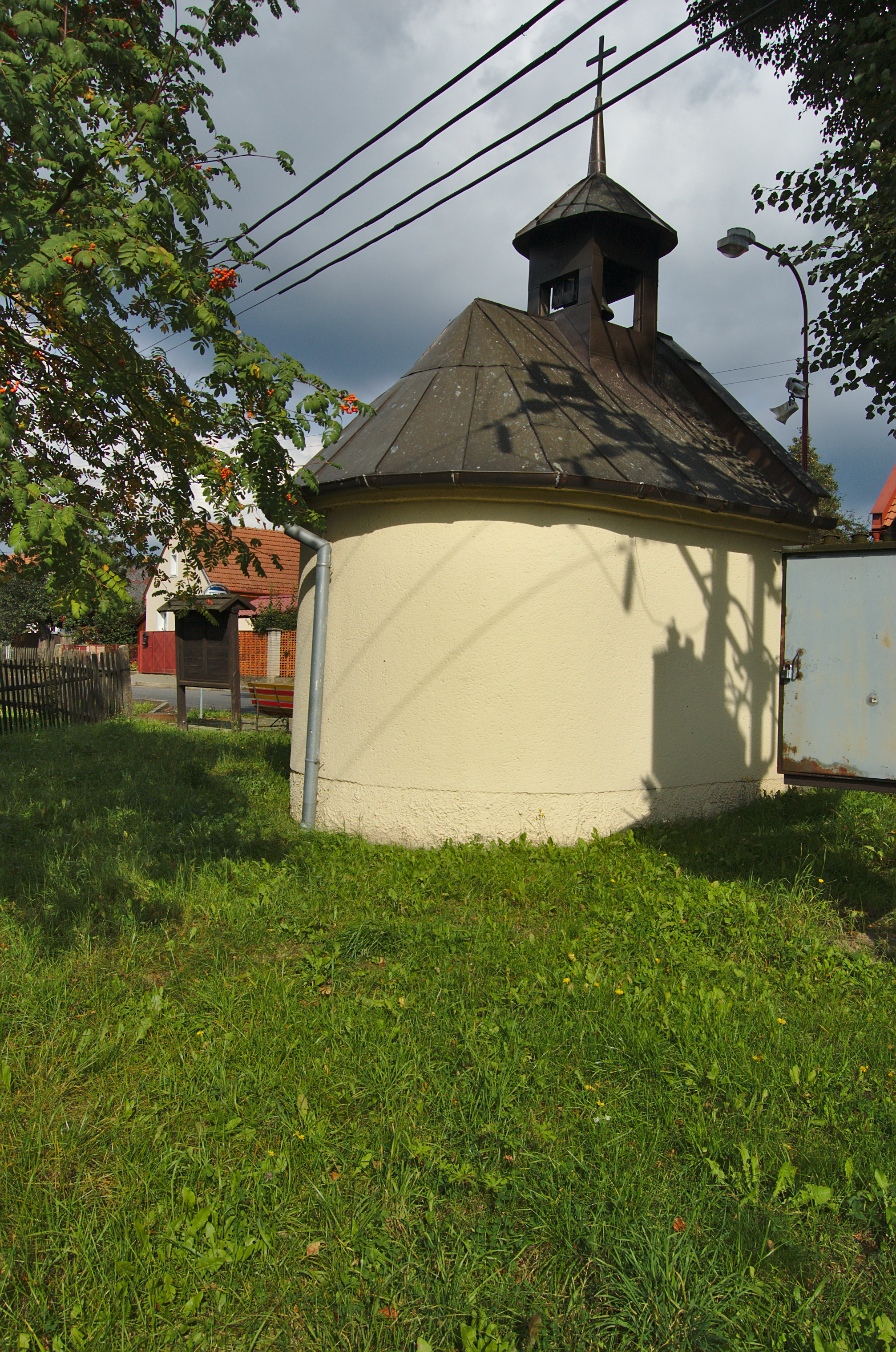 Kaplička, Nový Dvůr, Jaroměřice, okres Svitavy